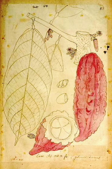 Oeuvres botaniques du père Charles Plumier, Fève de cacao, planche extraite du livre "Botinacum americanum" Artist Charles Plumier (1646-1704)Title Oeuvres botaniques du père Charles Plumier, Fève de cacao, planche extraite du livre "Botinacum americanum"Collection Muséum national d'histoire naturelle Native nameMuséum national d'histoire naturelleLocation57 rue Cuvier, 75005 Paris, FranceCoordinates48° 50′ 32″ N, 2° 21′ 22″ E Established1793Web page control : Q838691 VIAF: 130895847 ISNI: 0000 0001 2174 9334 ULAN: 500262724 LCCN: n80097456 NLA: 36565202 WorldCat institution QS:P195,Q838691Current location ParisSource/Photographer Réunion des musées nationaux This work is in the public domain in its country of origin and other countries and areas where the copyright term is the author's life plus 100 years or fewer. You must also include a United States public domain tag to indicate why this work is in the public domain in the United States. This file has been identified as being free of known restrictions under copyright law, including all related and neighboring rights.